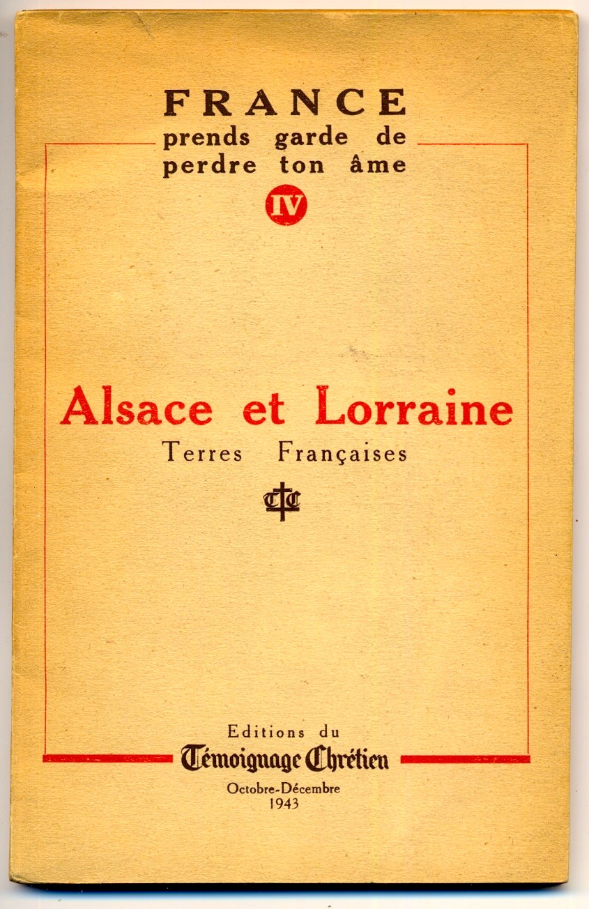 La couverture du « Témoignage chrétien » n° IV écrit par Pierre Bockel. Coll. C. Truong-Ngoc